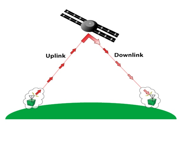 Descrizione di uplink e downlink